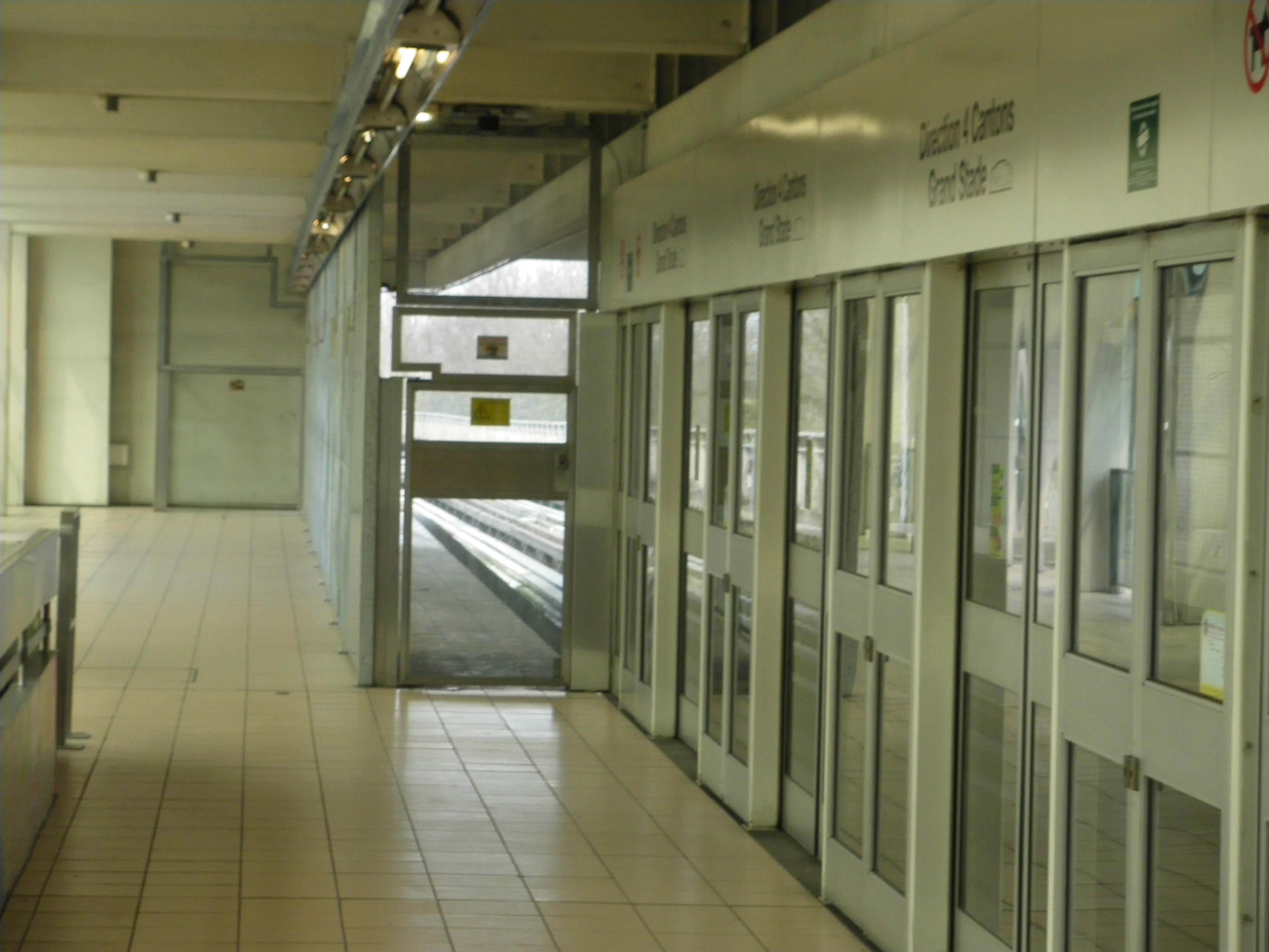 Station Cité Scientifique - Professeur Gabillard de la ligne 1 du métro de Lille Métropole.